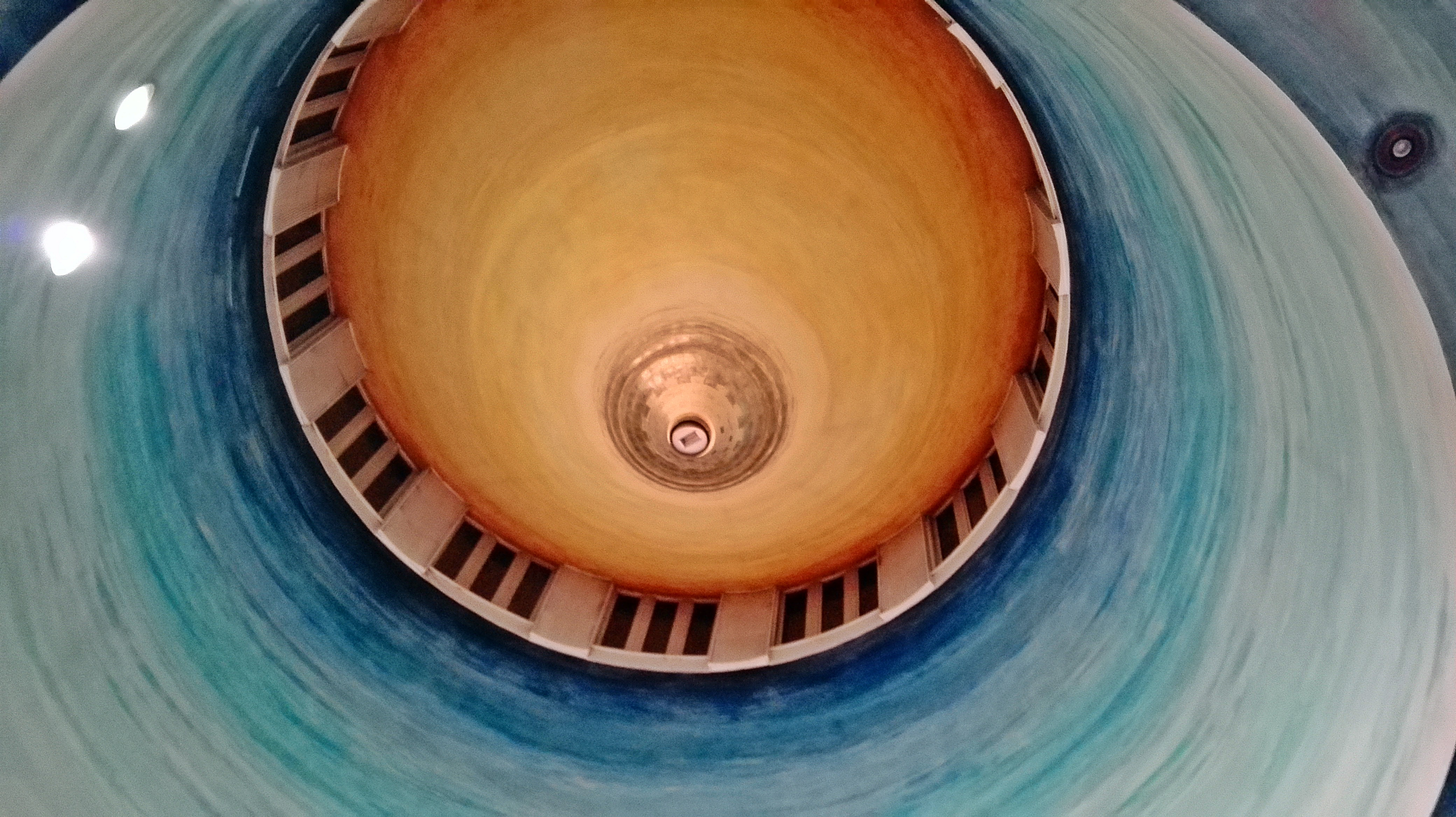 Sklepienie